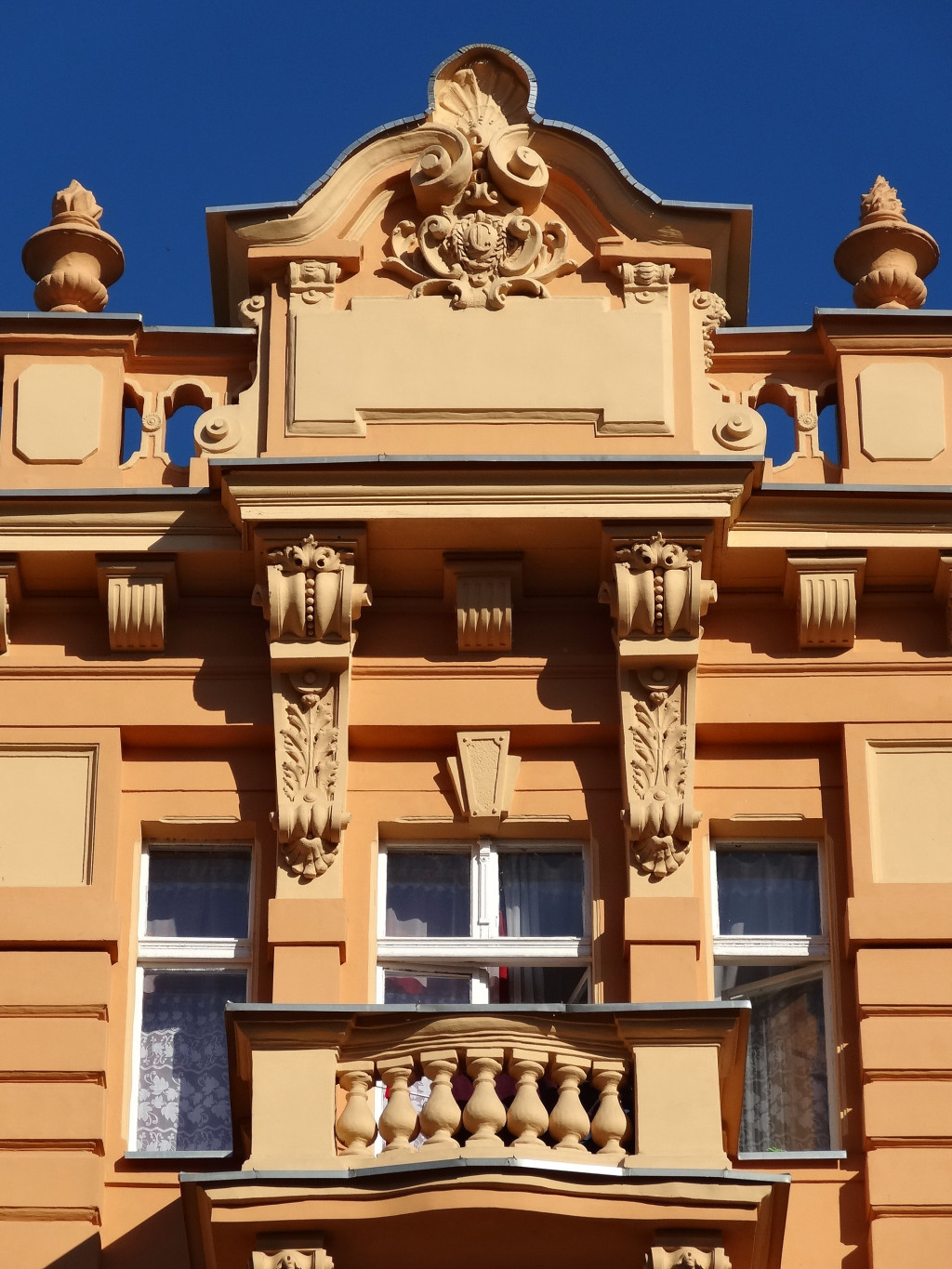 Kamienica przy ul. Gdańskiej 33 w Bydgoszczy